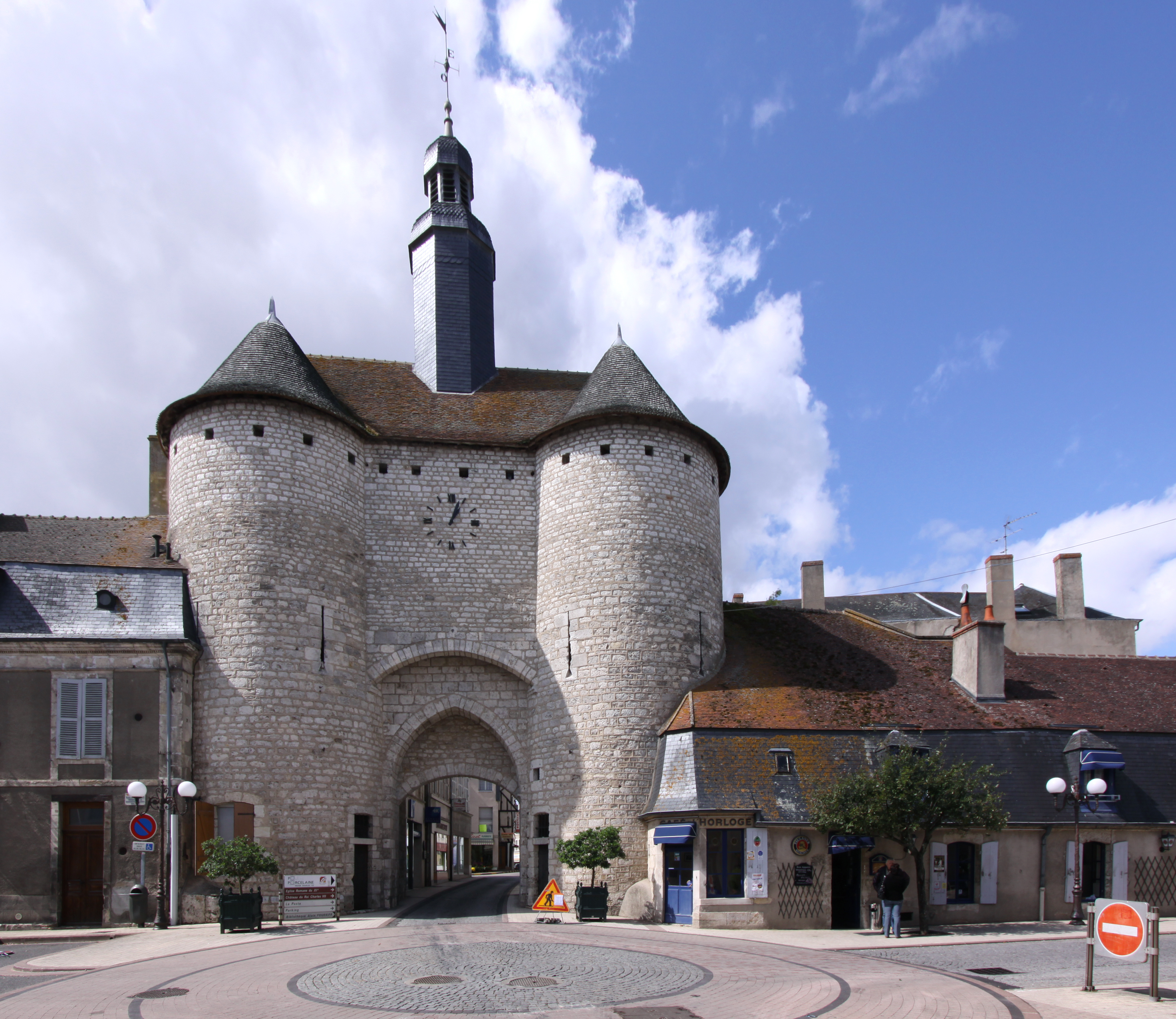 Ortschaft Mehun-sur-Yèvre im französischen Département Cher - Porte de l’Horloge